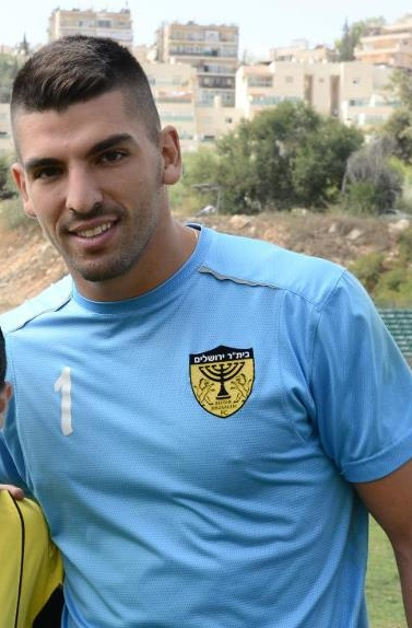 אריאל הרוש במדי בית"ר ירושלים